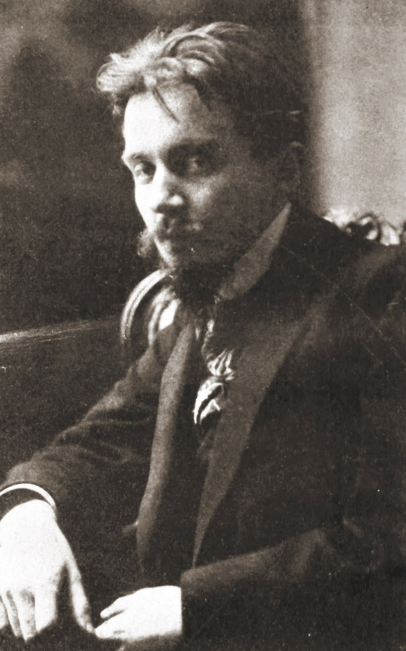 grafika z książki PL publikacja Księgarnia Polska Bernarda Połonieckiego Lwów 1910